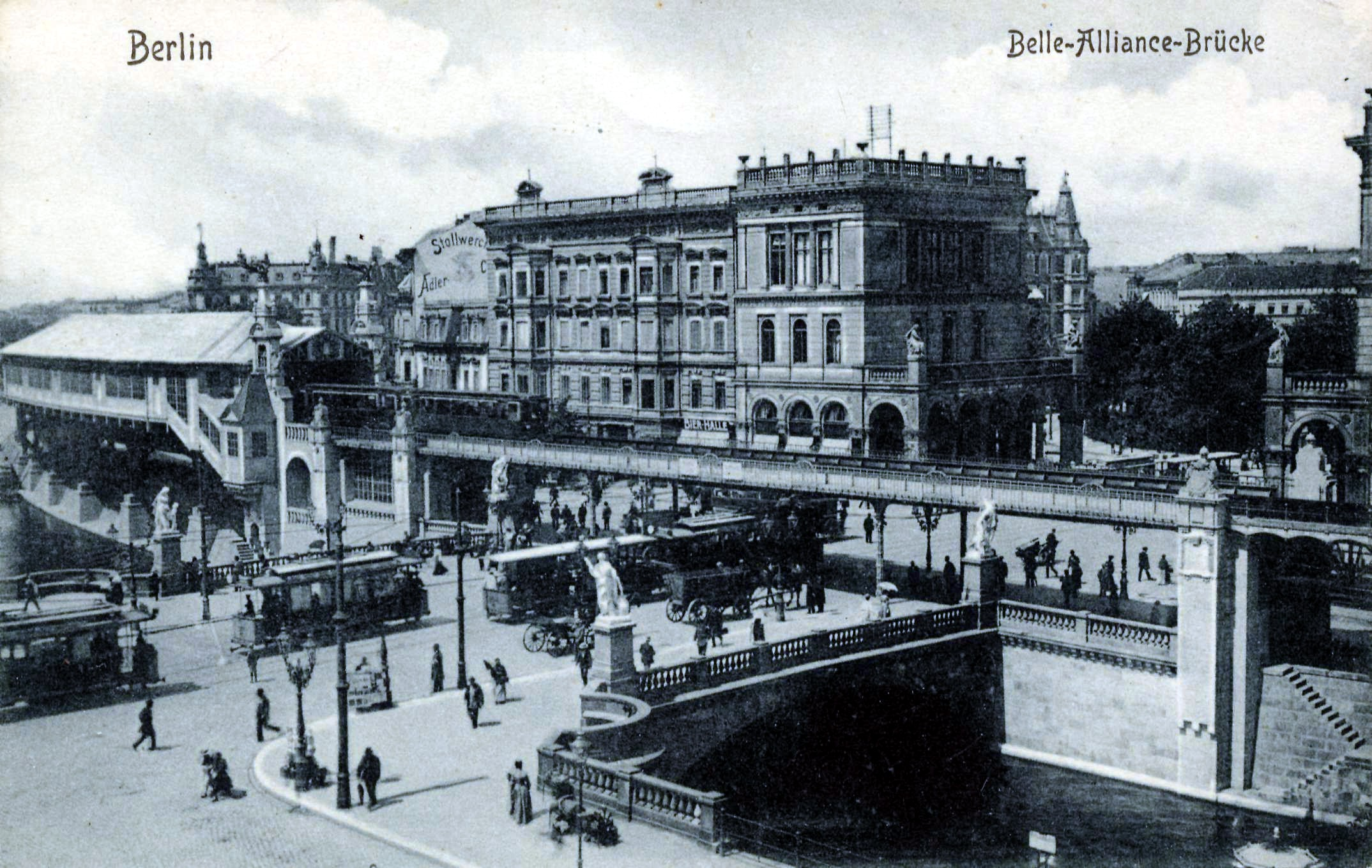 Belle-Alliance-Brücke (heute Hallesche-Tor-Brücke) und U-Bahnhof Hallesches Tor am Halleschen Tor in Berlin-Kreuzberg